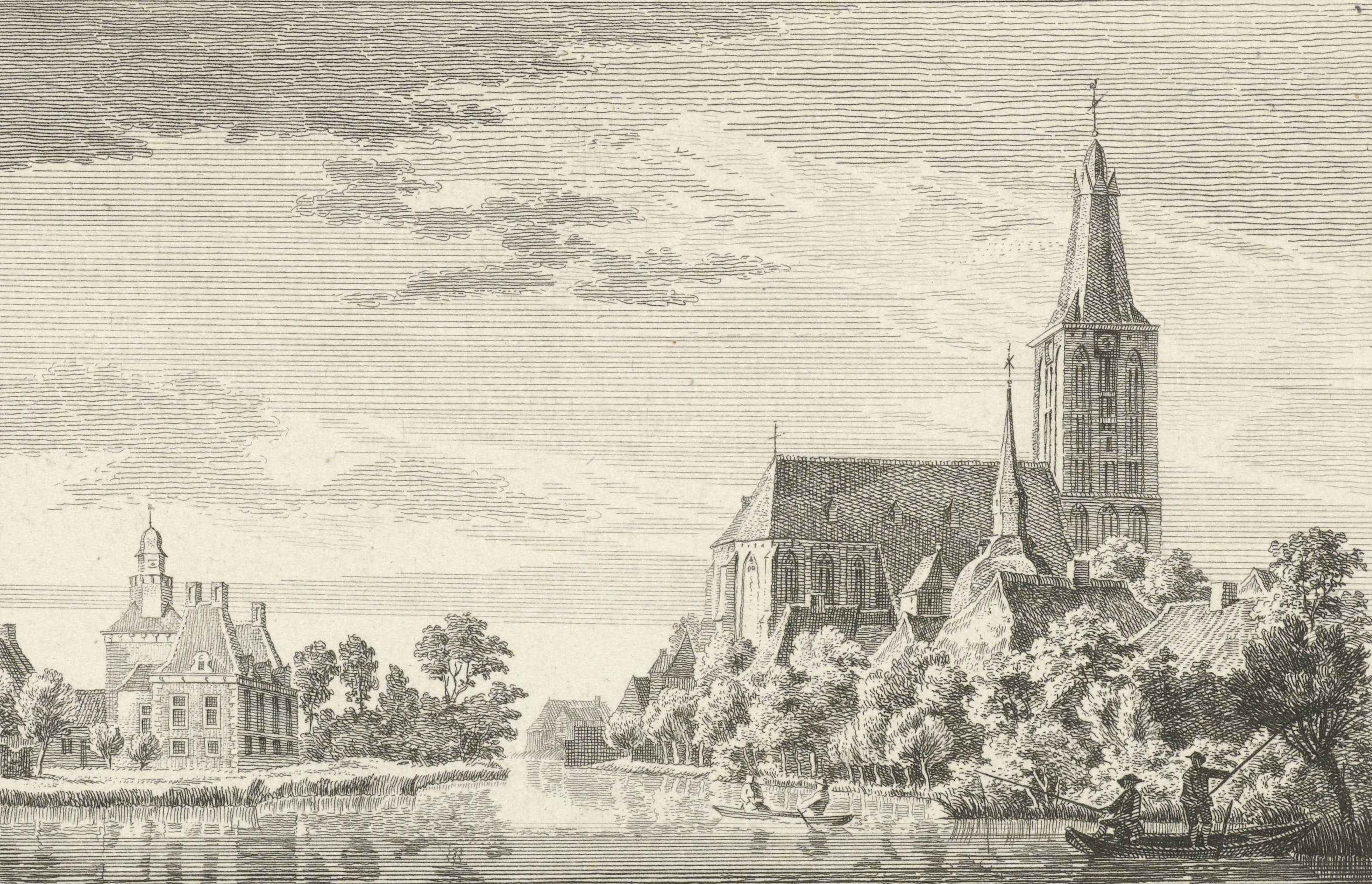 Kupferstich des Hauses Hertefeld und der Kirche St. Cyriakus in Weeze